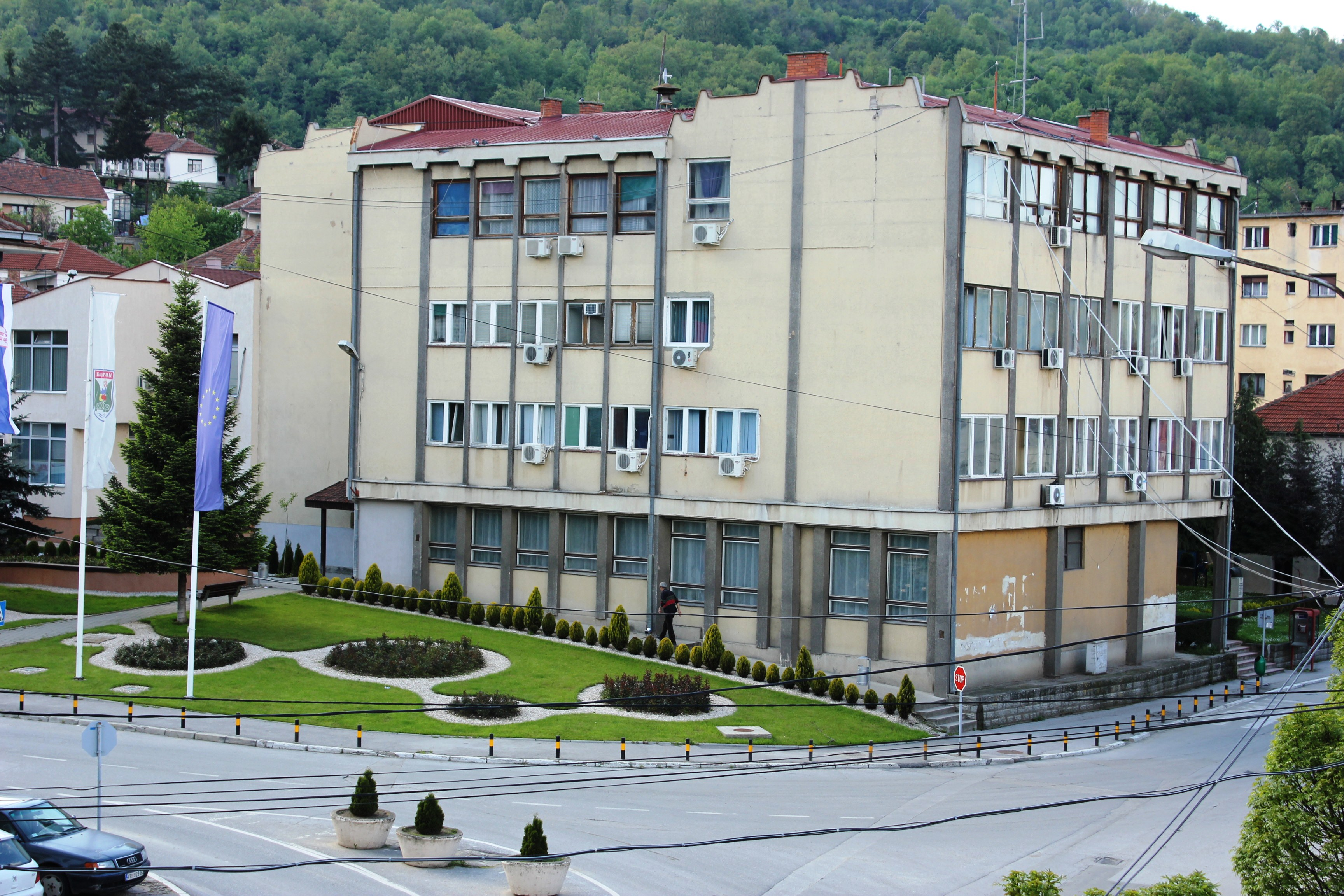 Сградата на общината в град Владичин хан, Сърбия.